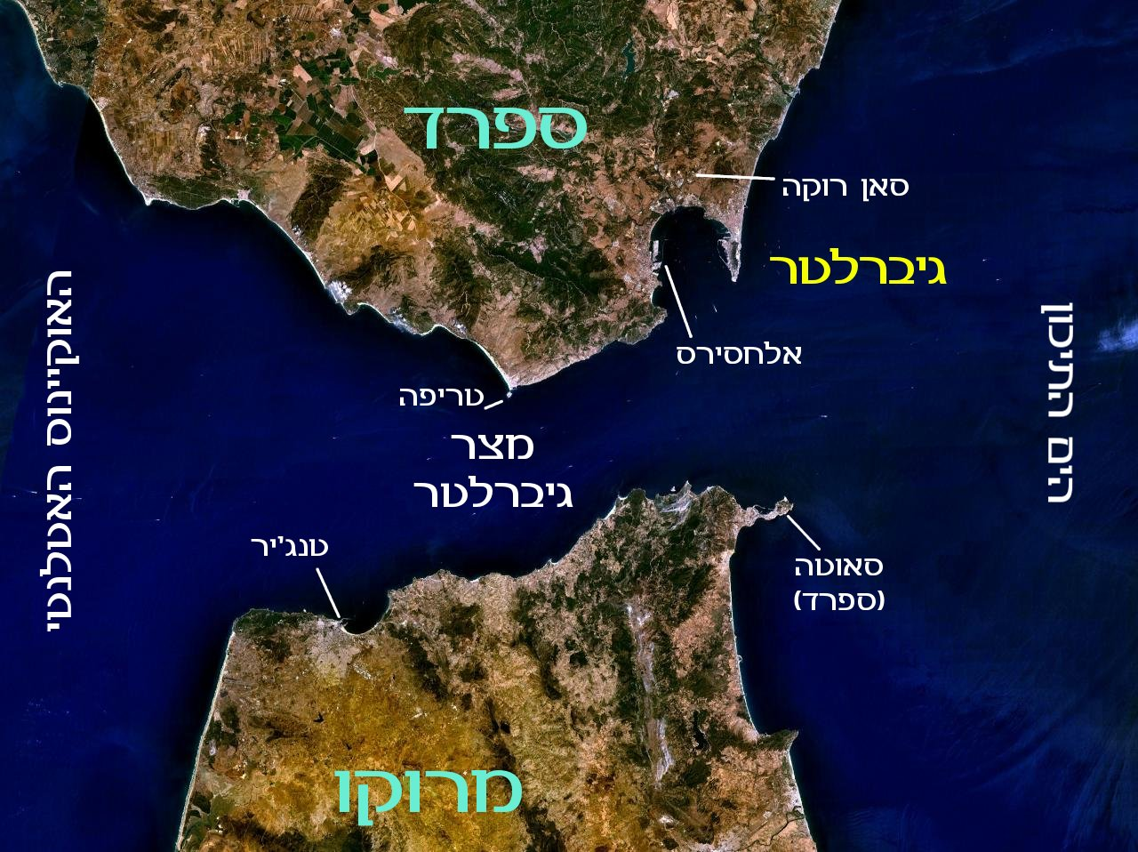 מצר גיברלטר